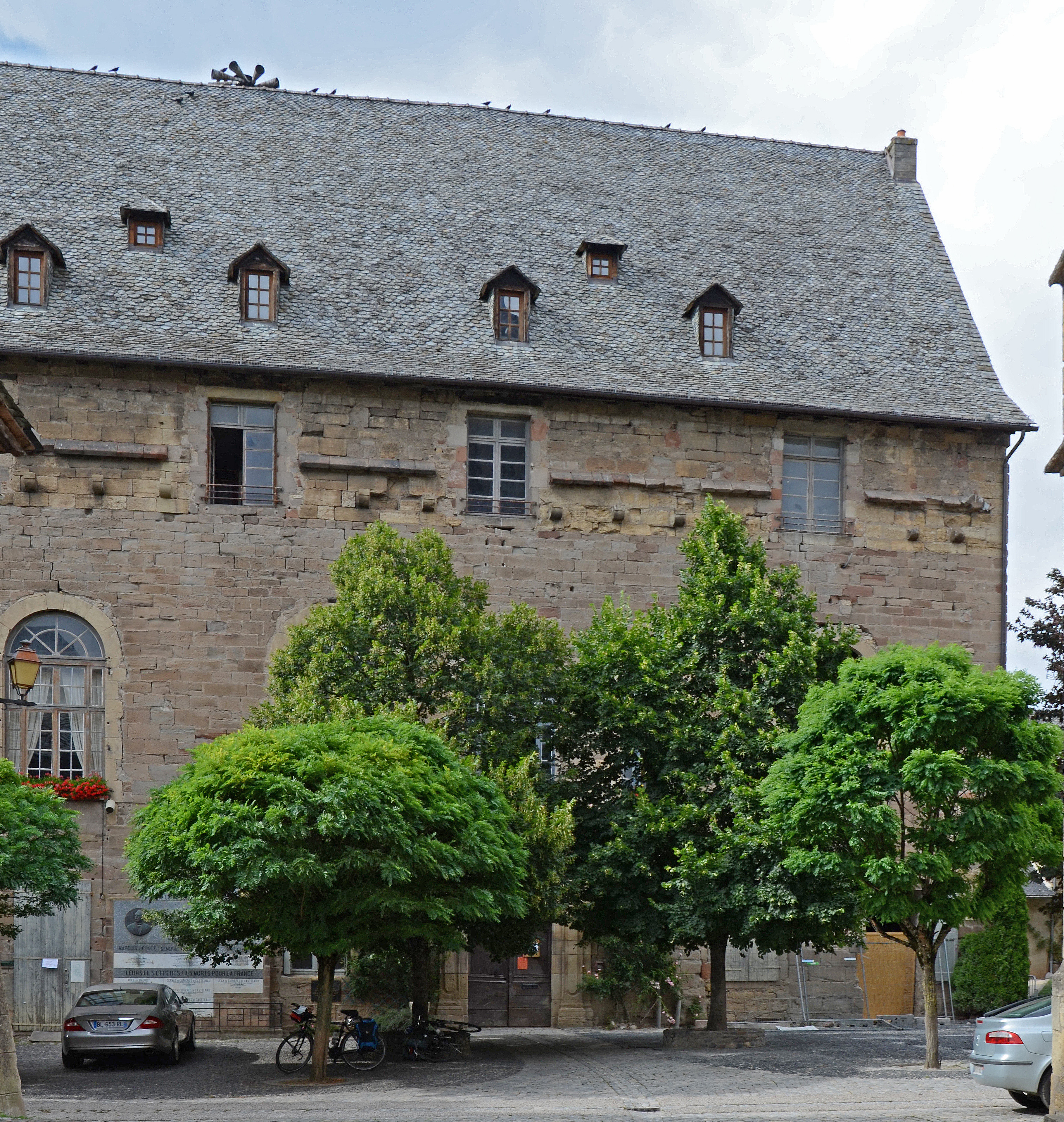 Hôtel de ville de Saint-Côme-d'Olt, Aveyron, France .